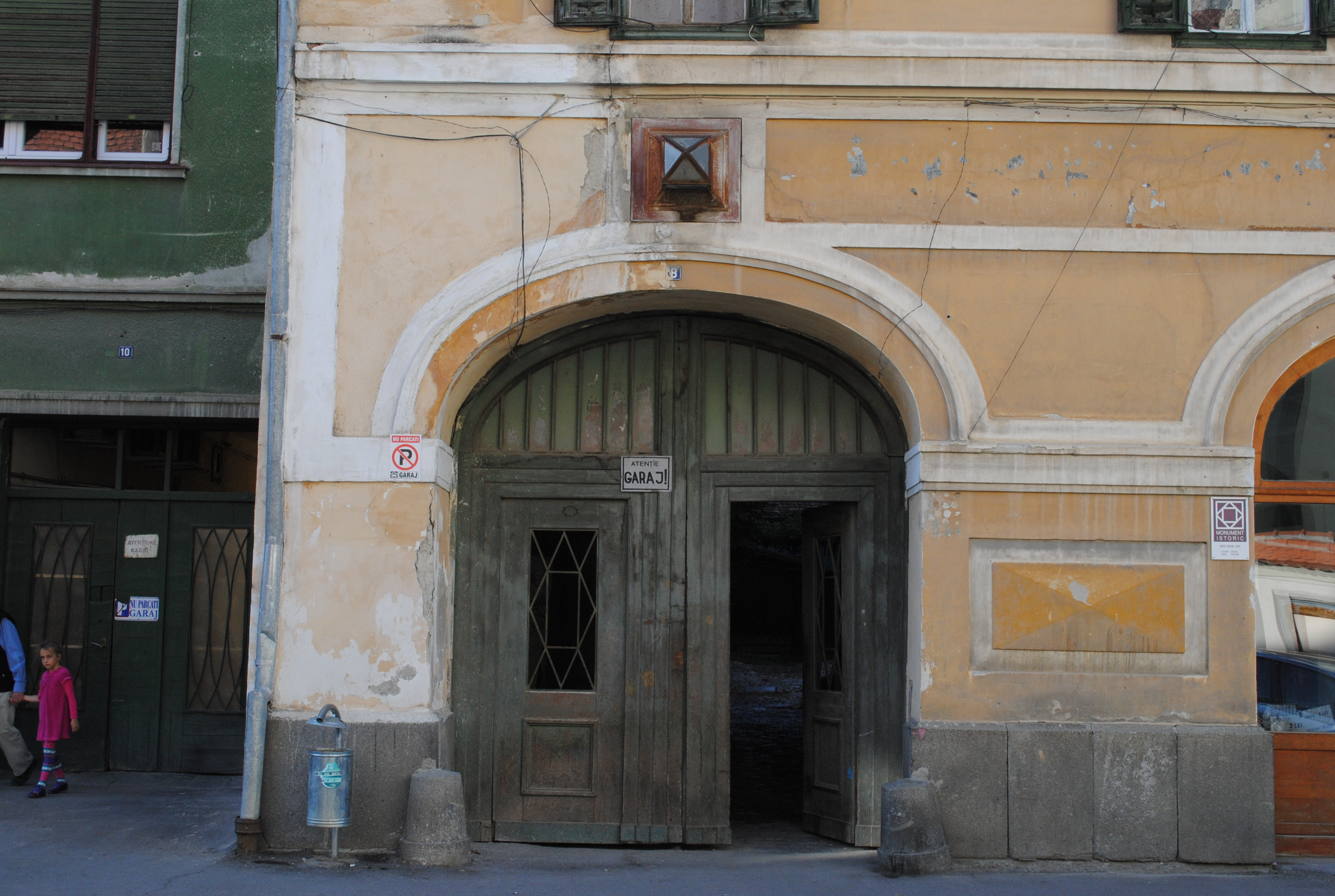 Casă, sf. sec. XVIII- înc. sec. XIX